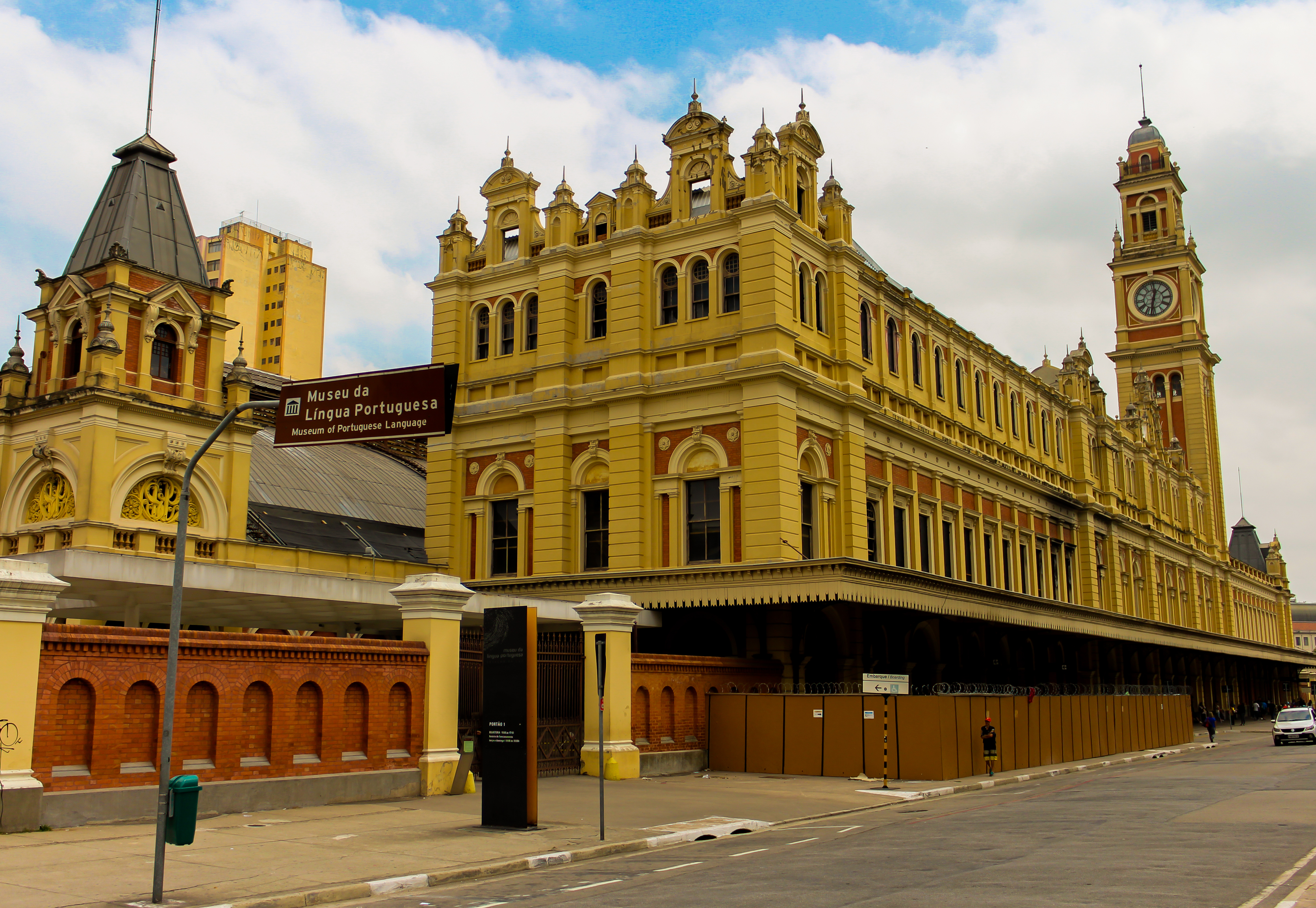 Estação da Luz